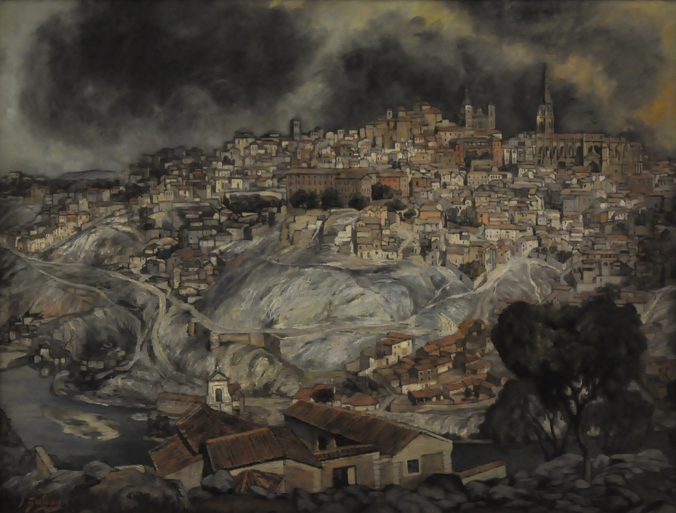 Ignacio Zuloaga Zabaleta (1870-1945) - Gezicht op Toledo - Madrid Bellas Artes